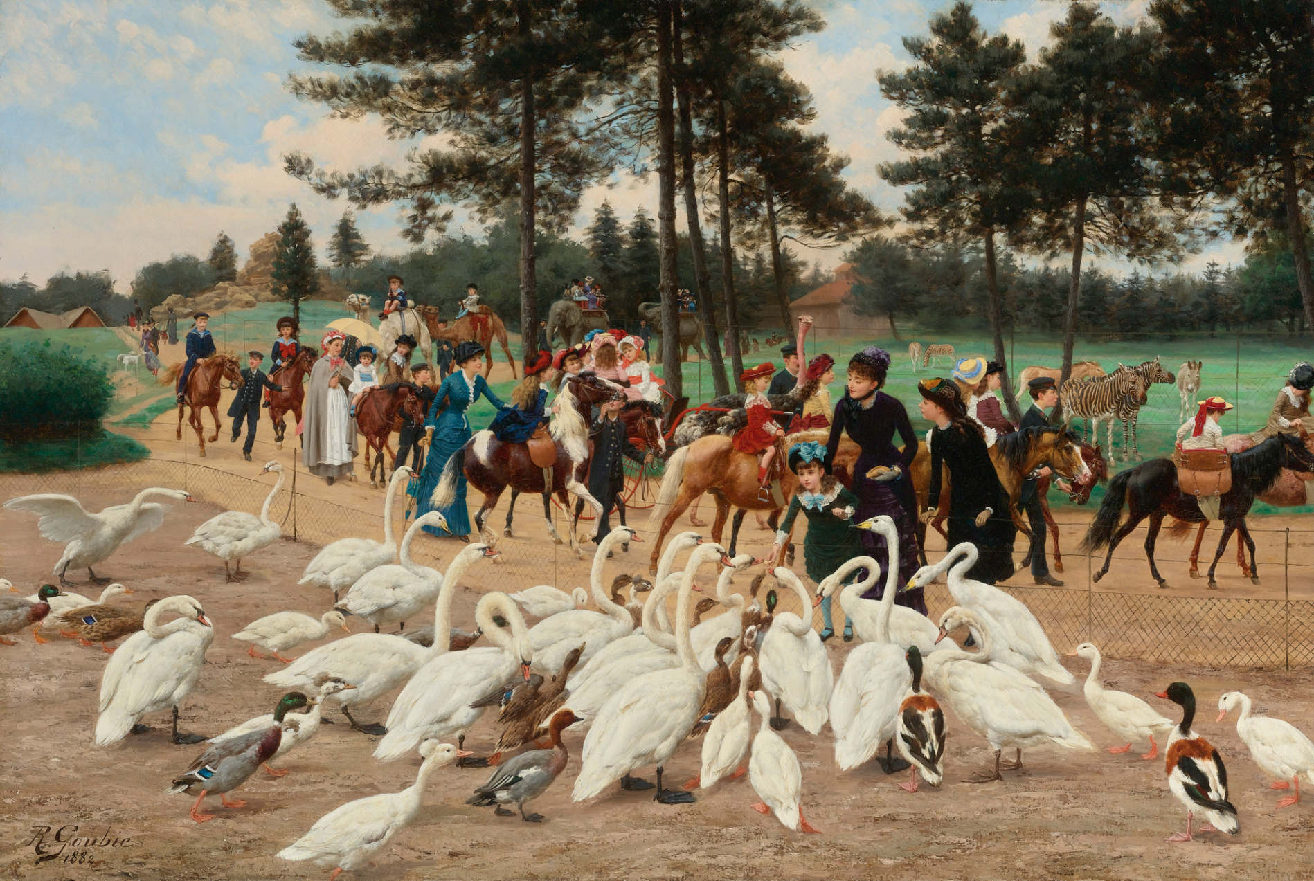 L'Apres-midi du dimanche au jardin d'Acclimatation